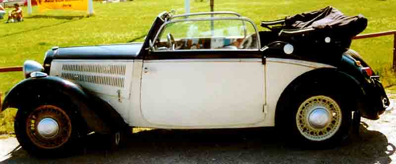 DKW Cabriolet